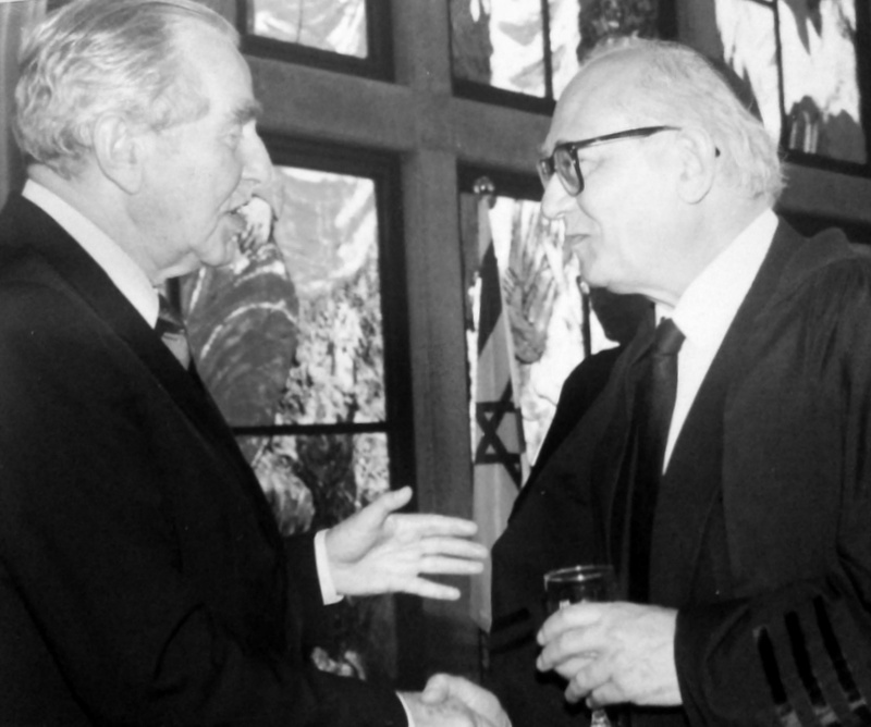 המועמדים לתפקיד נשיא מדינת ישראל בשנת 1983: פרופ' מנחם אלון (קואליציה) וחיים הרצוג (אופוזיציה) במשכן הנשיא בירושלים